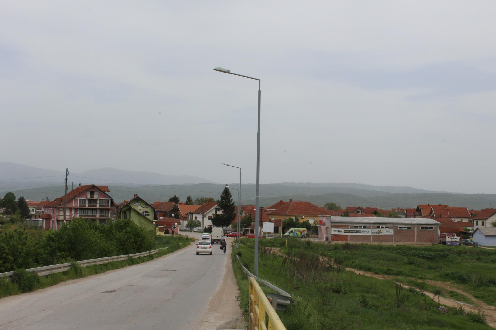 поглед са надвоњака